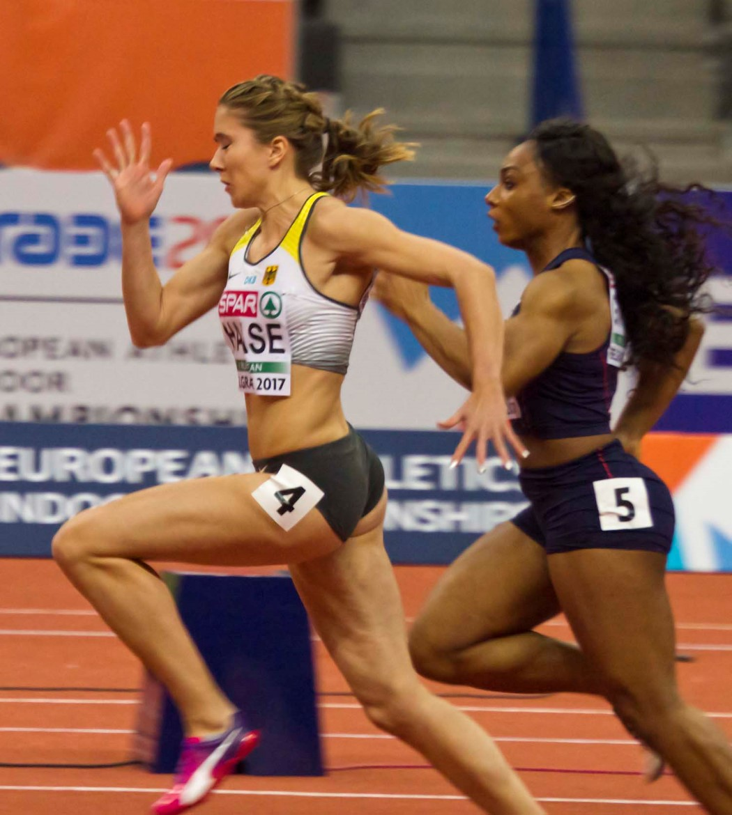 024 reeksen 60m haase